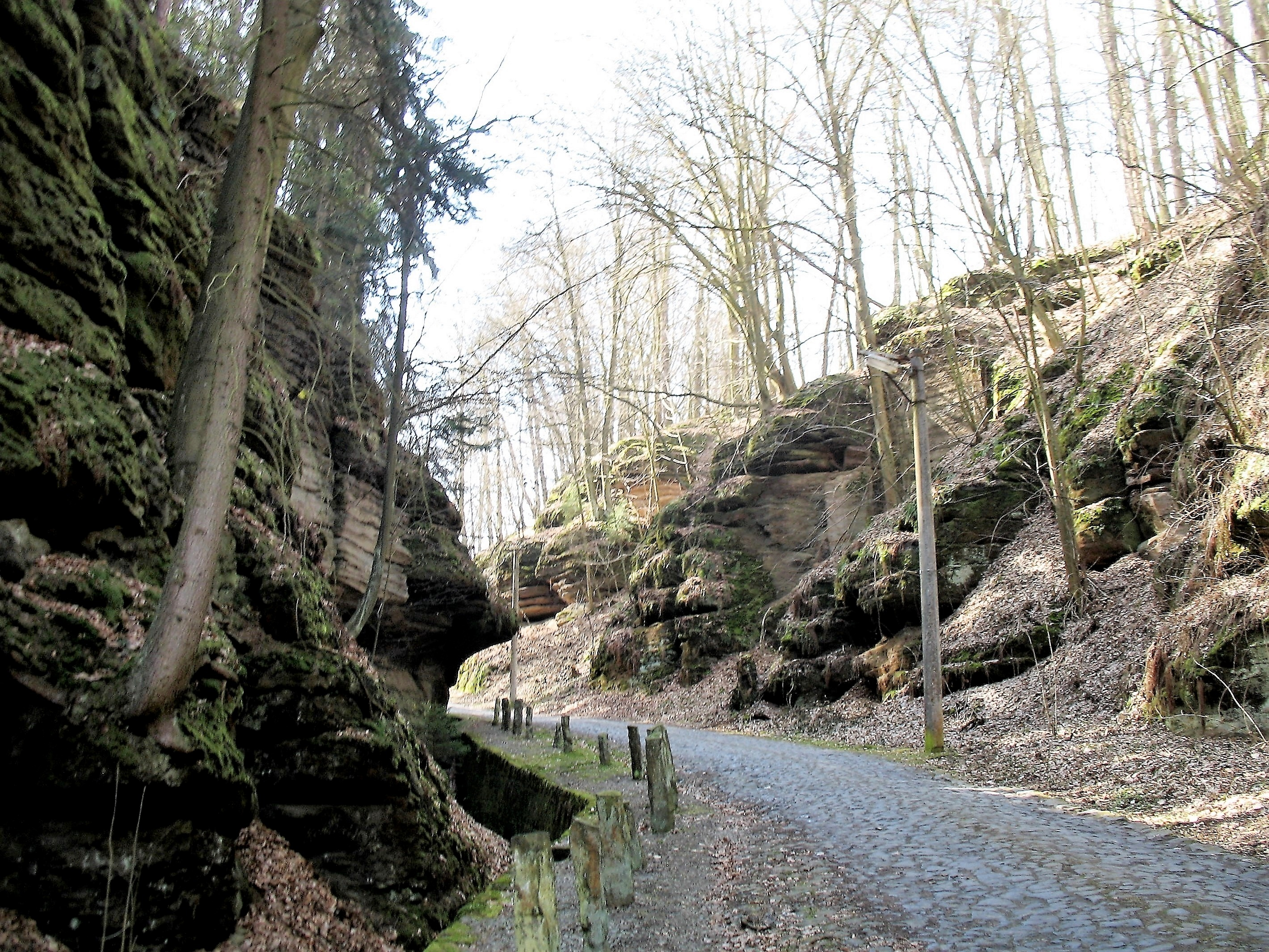 Barokní dlážděná cesta ze 17. století v Pavlovicích (Jestřebí, okres Česká Lípa). Cesta spolu s trojicí skalních výklenků a tzv. Knížecí studánkou v údolí Švábského potoka v Popelově je zapsána na seznamu nemovitých kulturních památek ČR